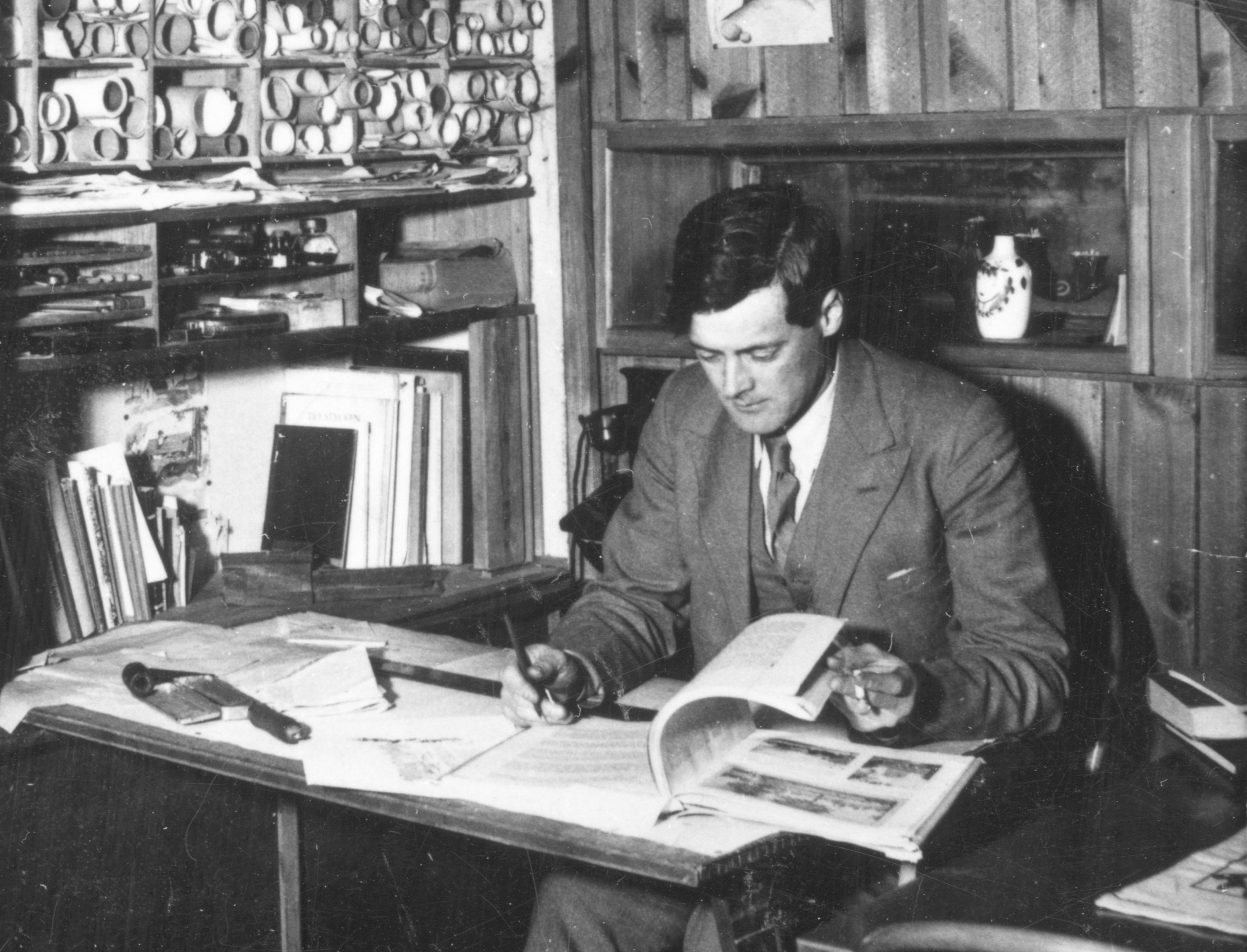 Arkitekt Ralph Erskine i "Lådan" (the box) i Länna, Sverige